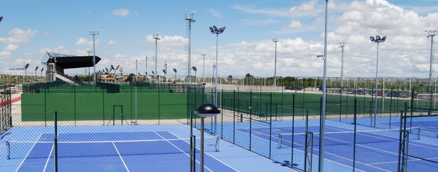 Campus deportivo de Universidad San Jorge